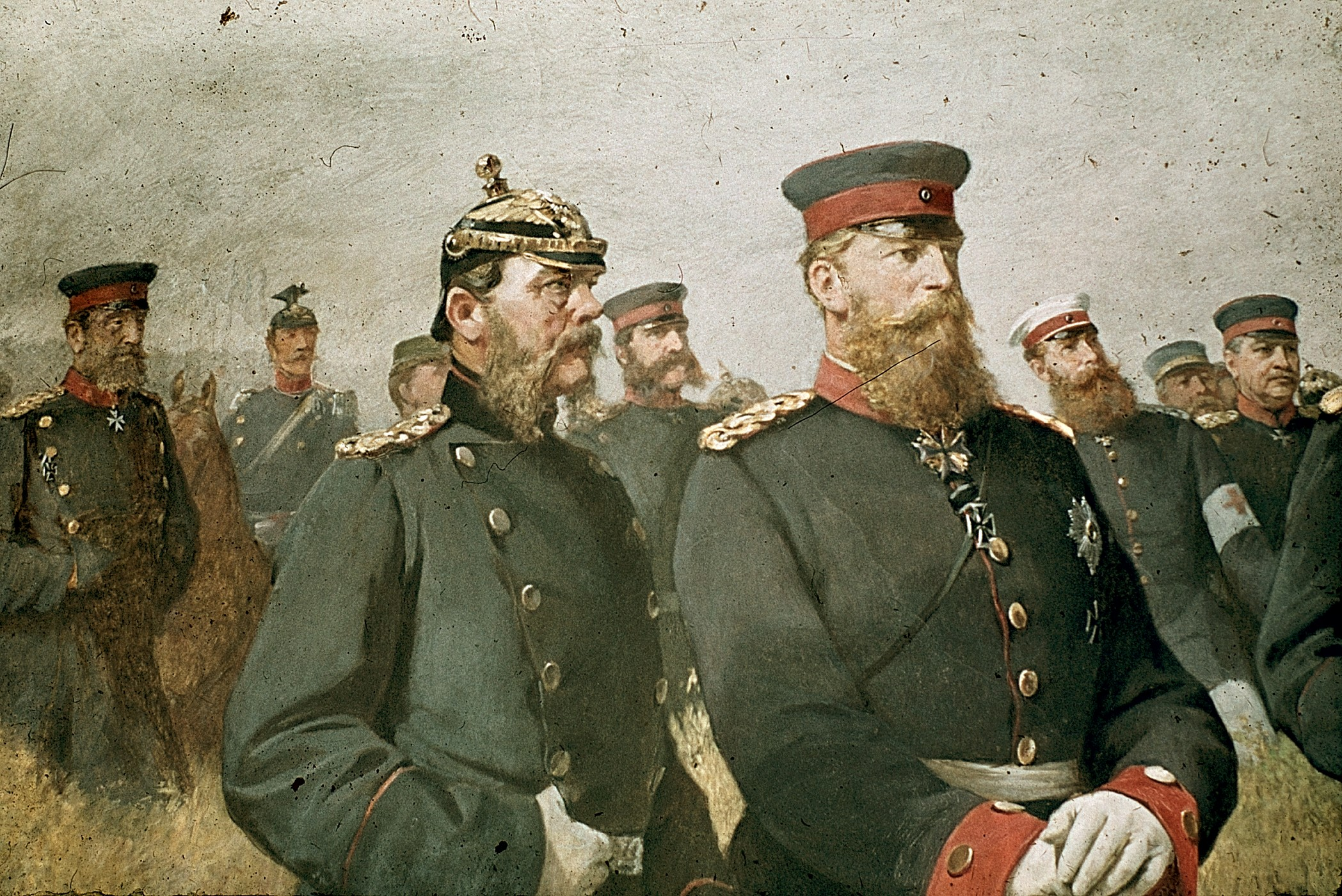 General Reille überbringt König Wilhelm I. auf dem Schlachtfelde von Sedan das Schreiben Kaiser Napoleons. Wandgemälde von Carl Steffeck (1884) für die ehemalige Ruhmeshalle Berlin. Zerstörung nach Bombentreffer um 1944. Detail: Left to right: General Leonhard von Blumenthal ? The Crown prince of Saxony, later King Albert von Sachsen (with Pickelhaube) The Crown prince and later Emperor Friedrich III of Germany (red beard) ? ?